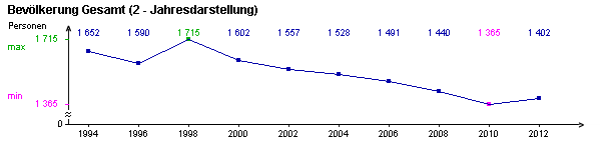 Bevölkerungsentwicklung in Seelingstädt / Ostthüringen